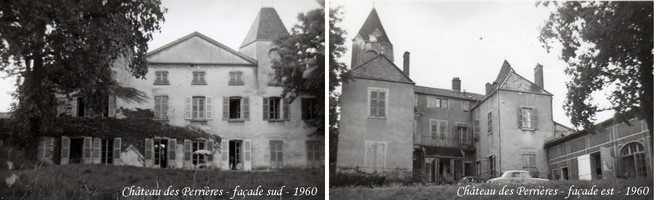 Château des Perrières - 2 façades - 1960 - Photo personnelle de l'auteur